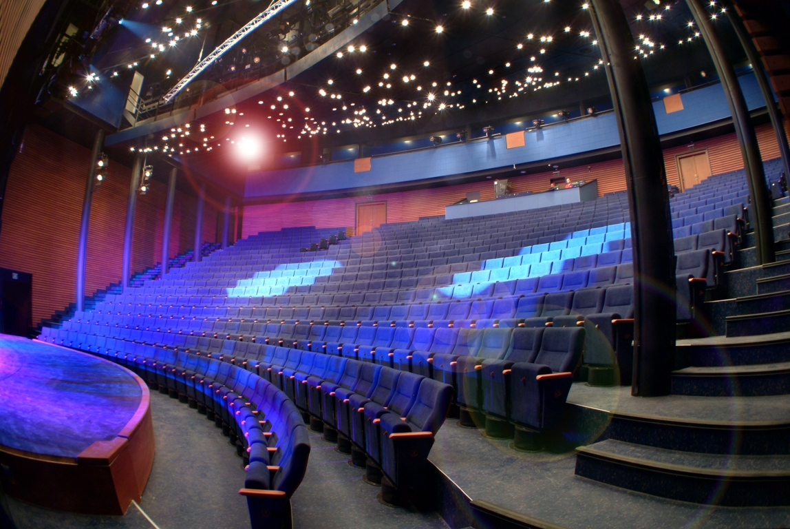 Hlediště Hudební scény Městského divadla Brno